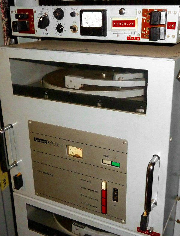 Zeitansagegerät mit Magnetplatte und drei Tonarmen, ähnlich wie bei einem Plattenspieler